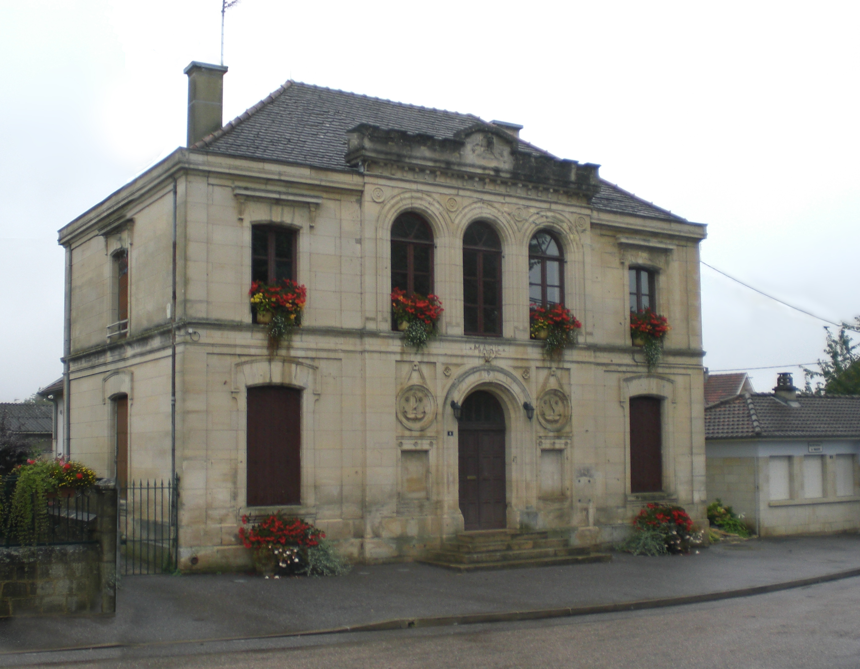 Gemeindeverwaltung Valcourt, canton de St. Dizier, Haute-Marne